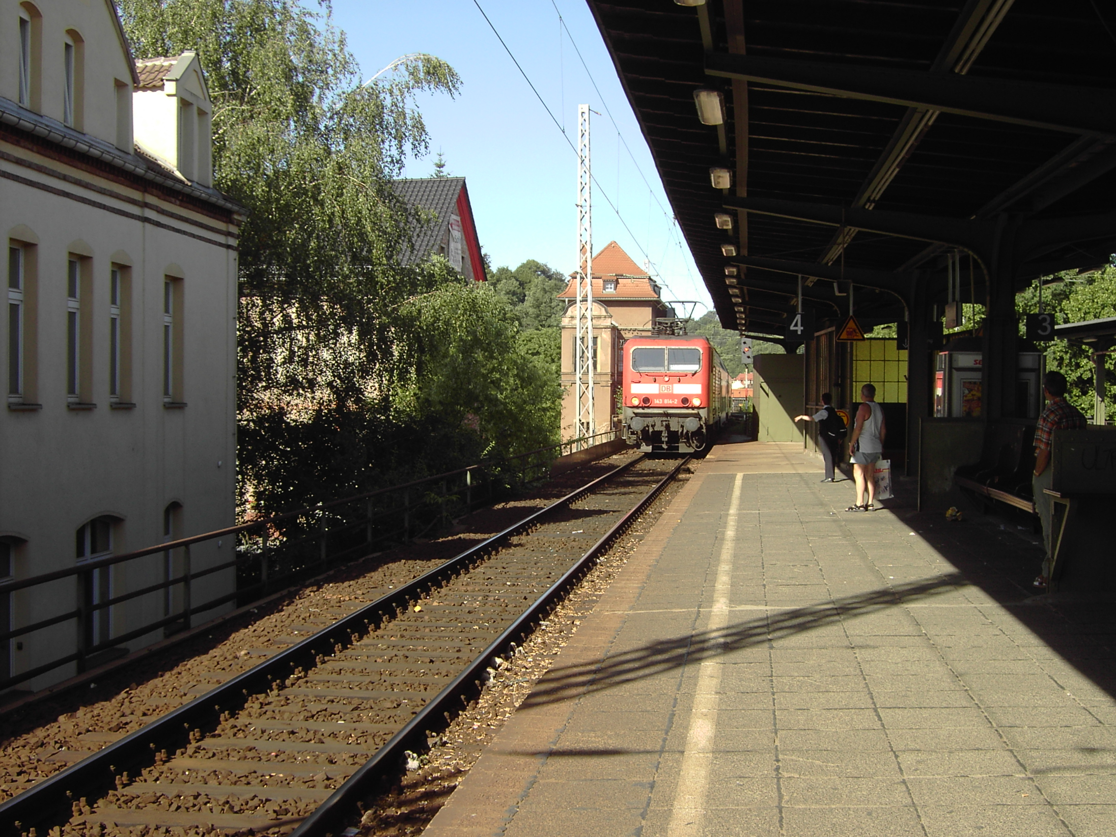 DB 143 814 mit Doppelstockzug auf der S1 der S-Bahn Dresden im Bahnhof Meißen.